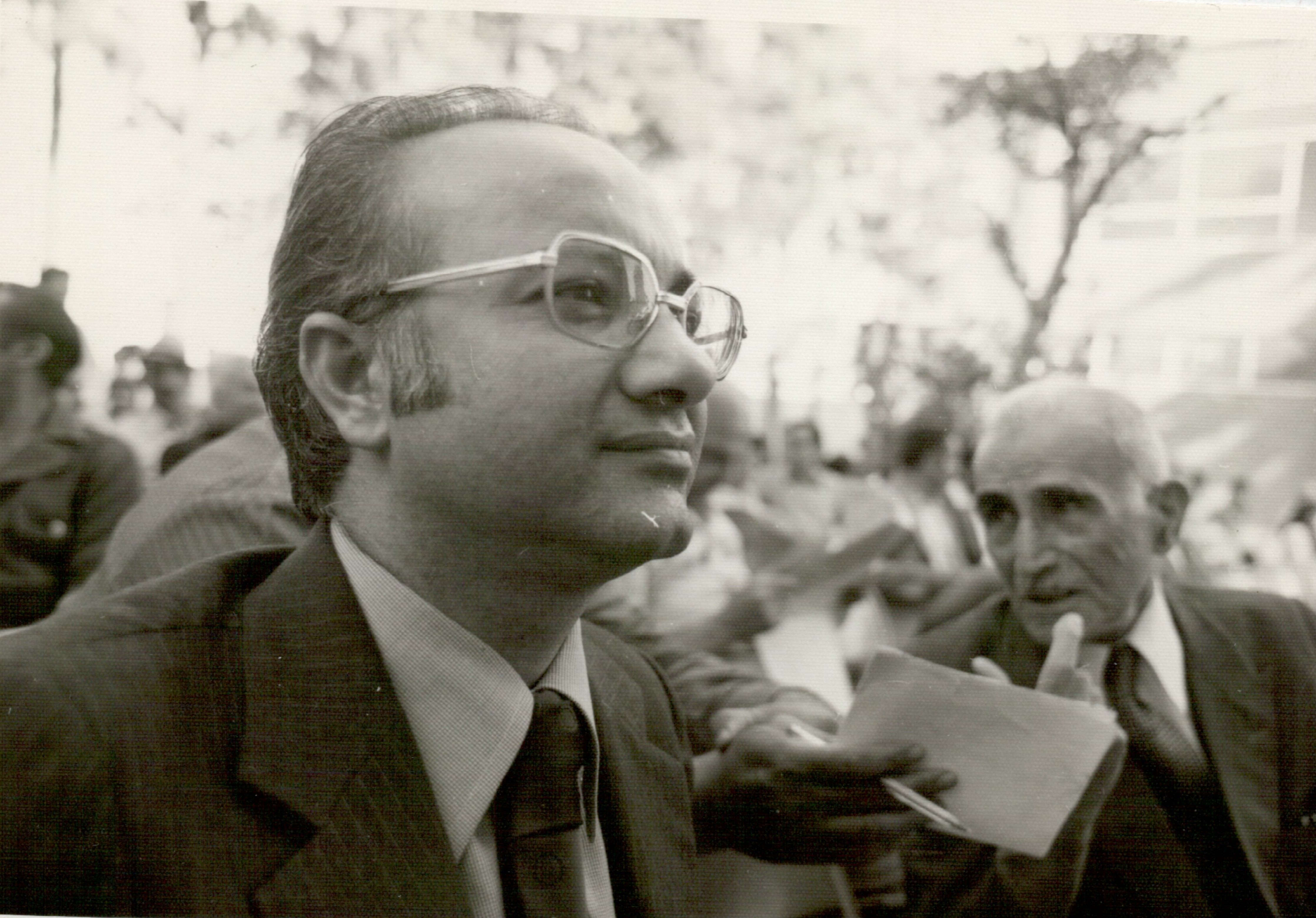 1358 باشگاه جبهه ملی ایران